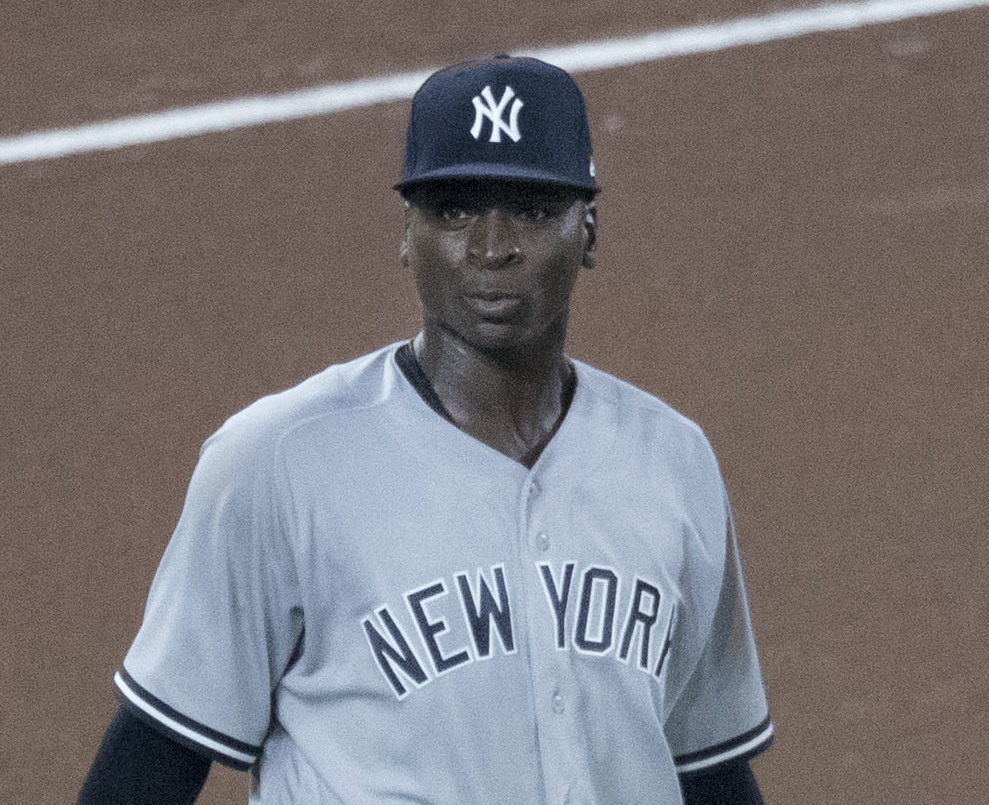 Yankees at Orioles 9/5/17